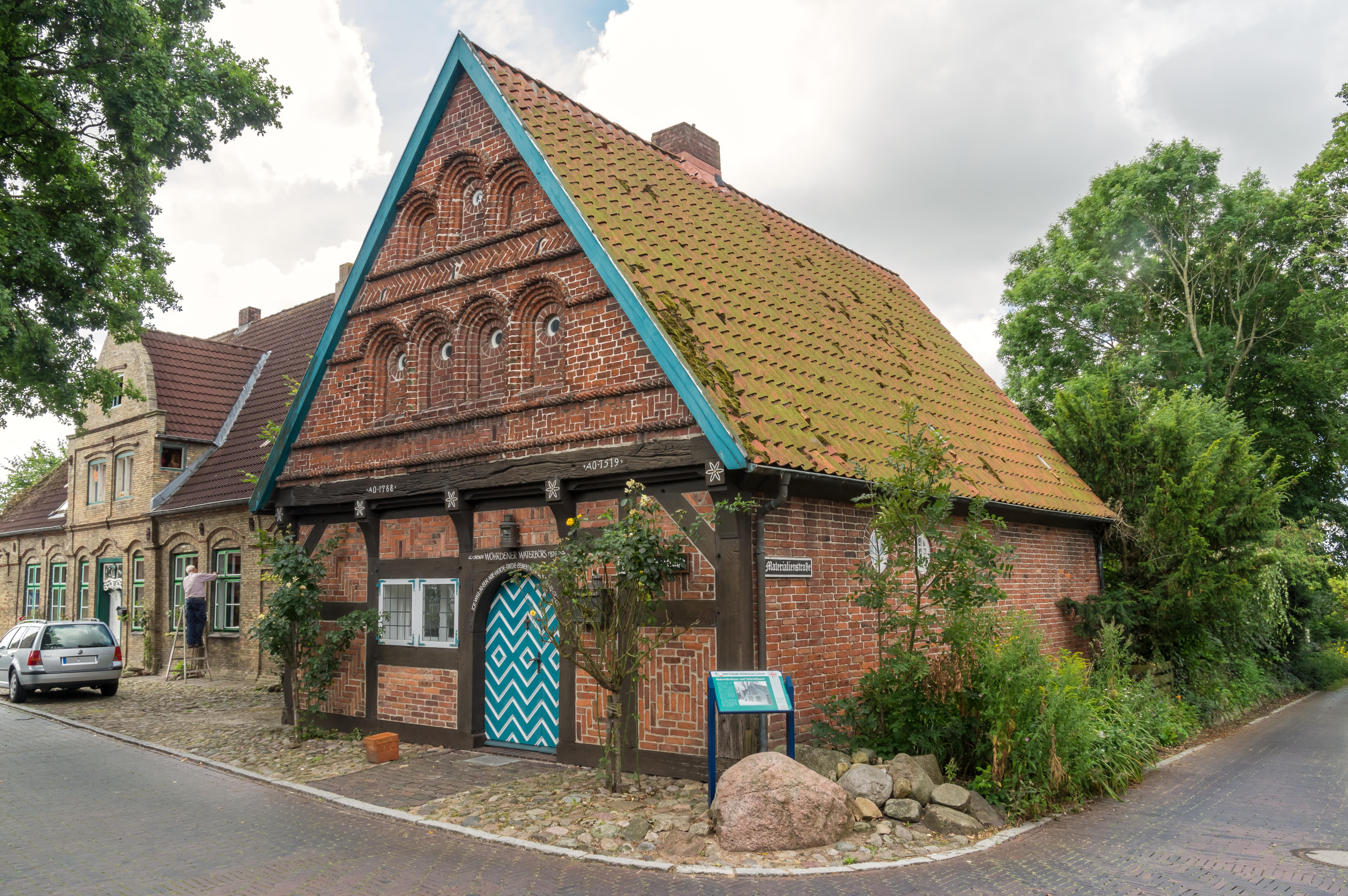 Bilder aus Wöhrden Historisches Gebäude am Kirchplatz